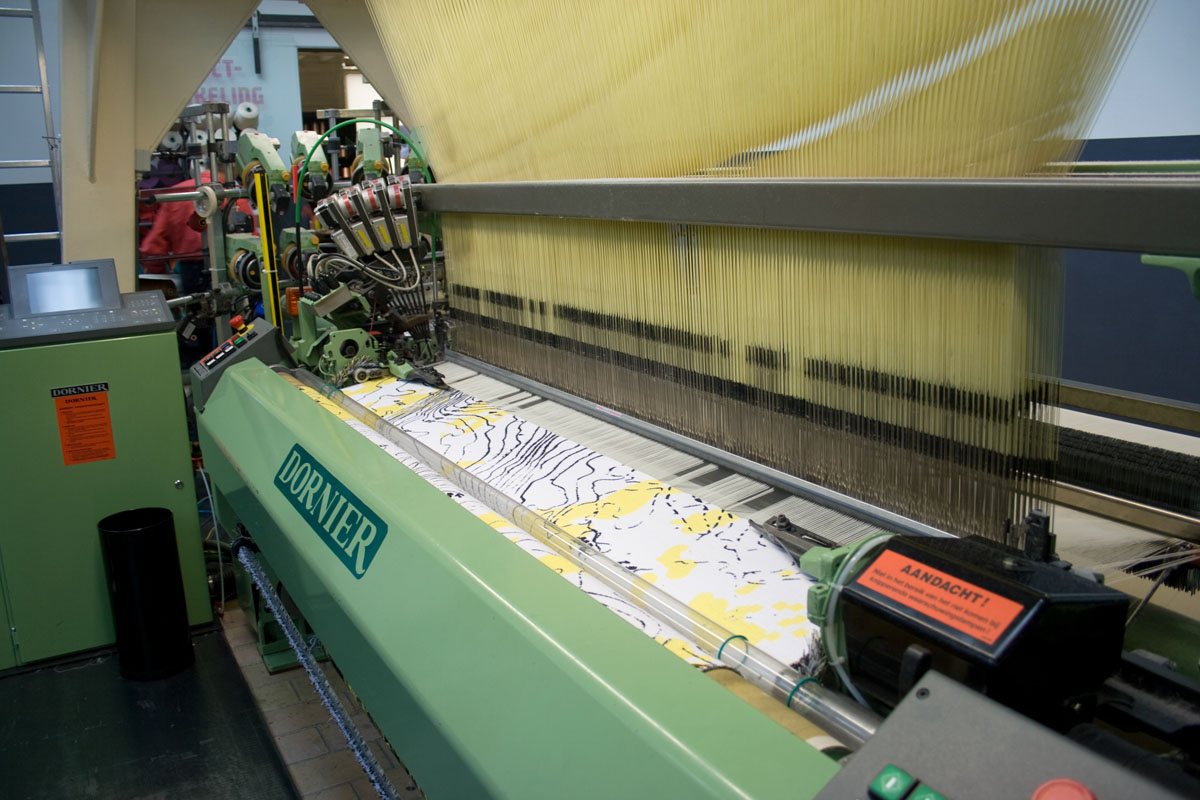 Grijperweefmachine Dornier (Lindau am Bodensee), 2006 (13064) Grijperweefmachine Dornier(2006)